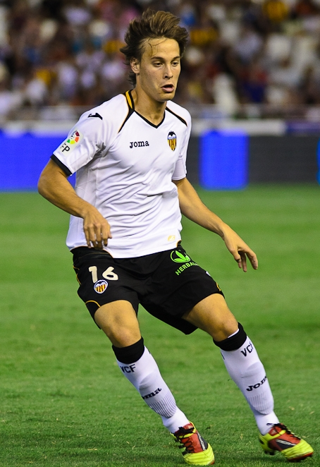 El jugador merengot Sergio Canales